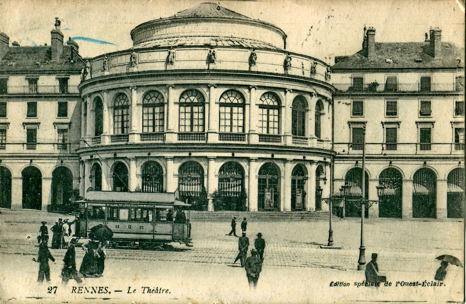 Carte postale ancienne éditée l'Ouest-Éclair, n°27 :Rennes - Le Théâtre.Vue en gros plan d'une motrice du Tramway de Rennes